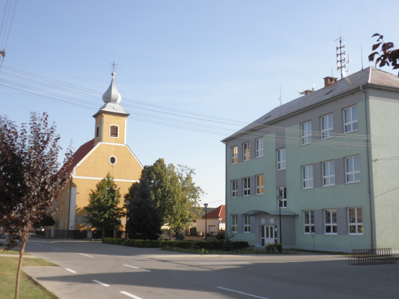 Vága központja